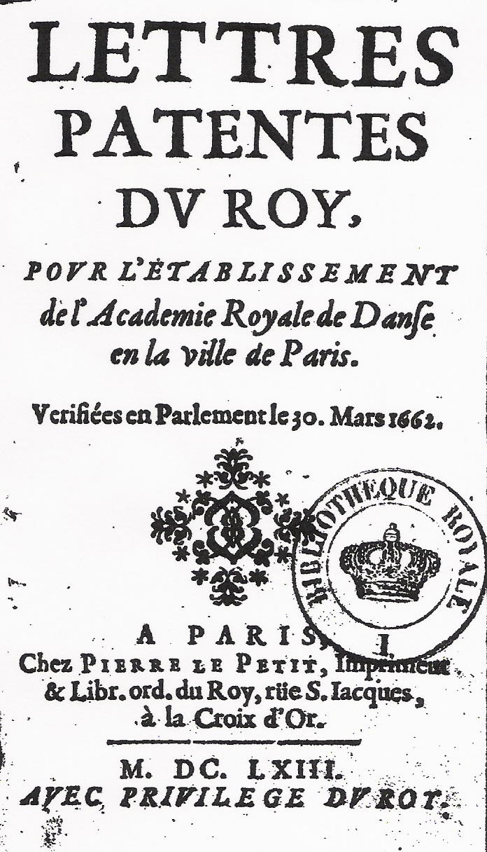 Photocopie de l'exemplaire de la Bibliothèque royale de Belgique